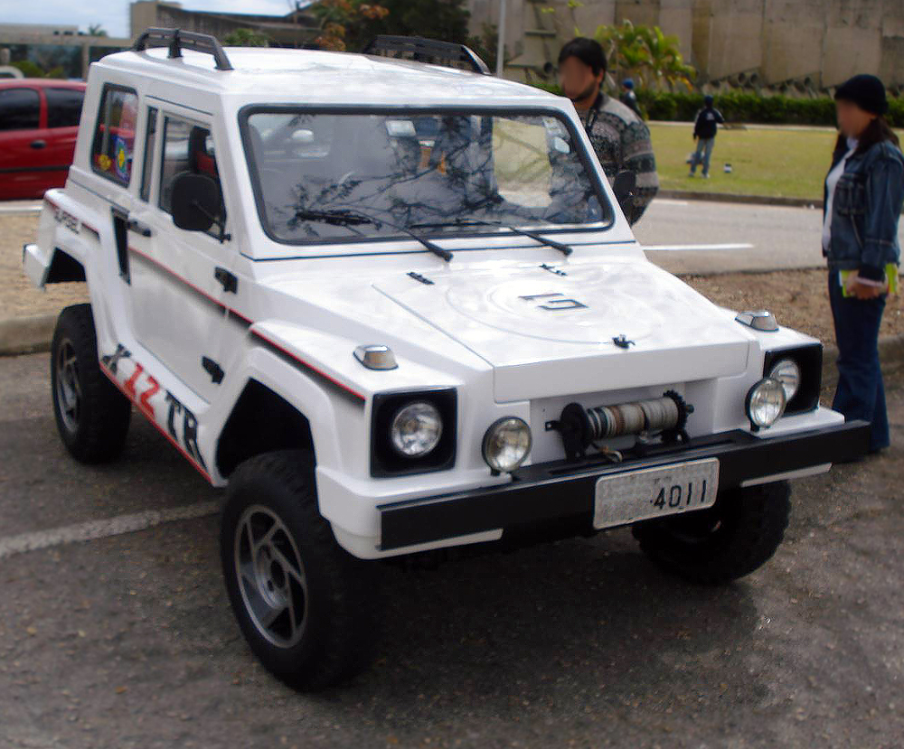 Gurgel X12 TR at a Gurgel meet in Sorocaba, Brazil